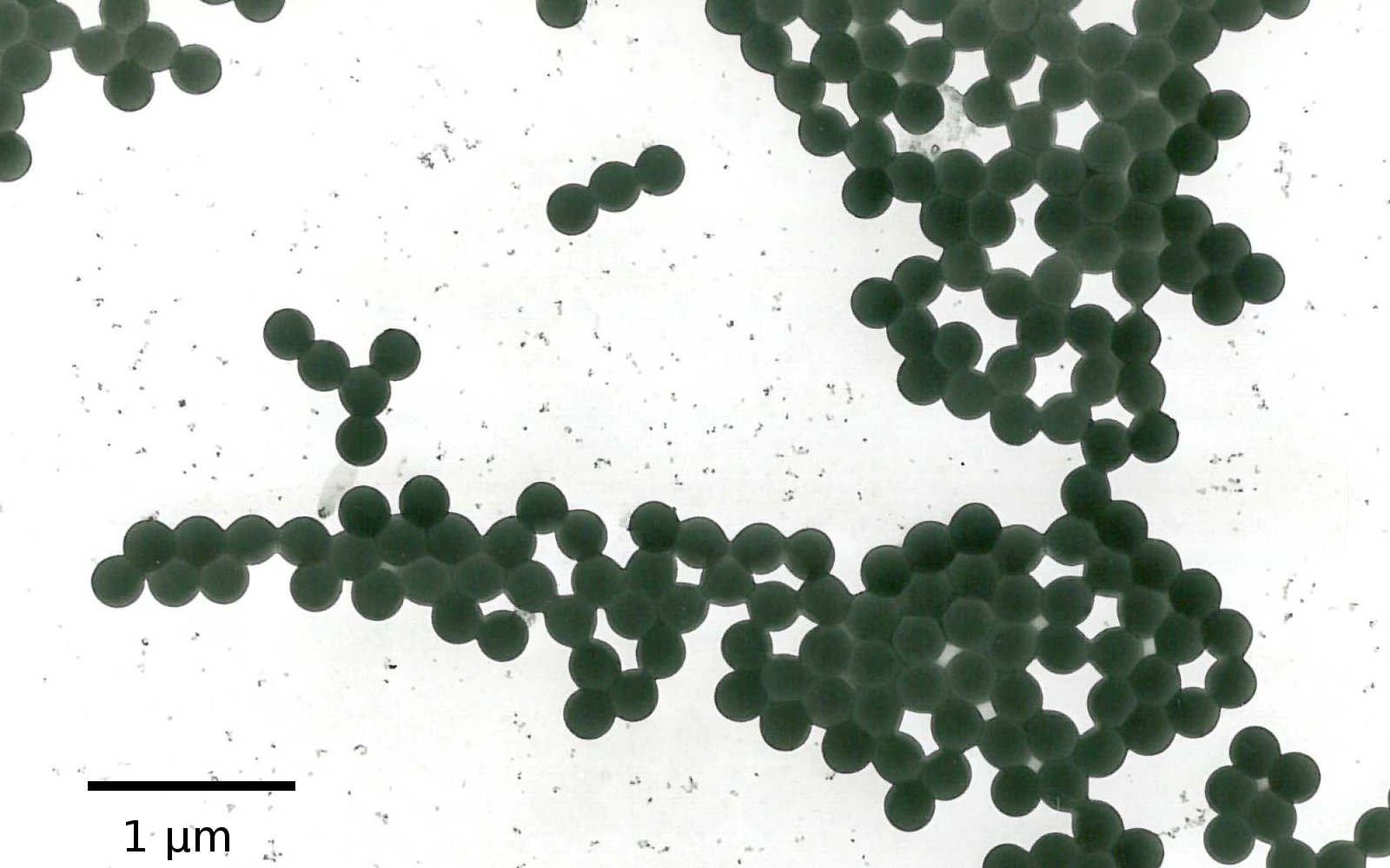 TEM-Aufnahme eines Polystyrenlatex (Rutheniumkontrastierung)